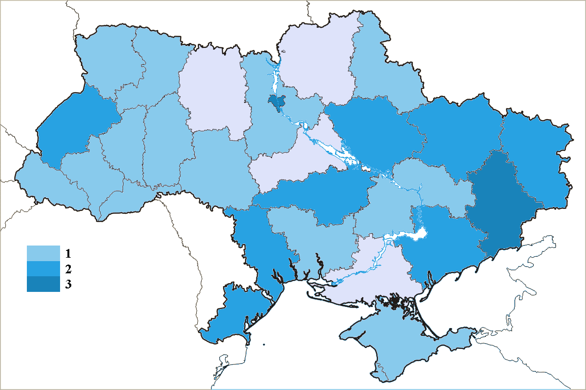 Зустрічі ФК "Дніпро" у Чемпіонатах України